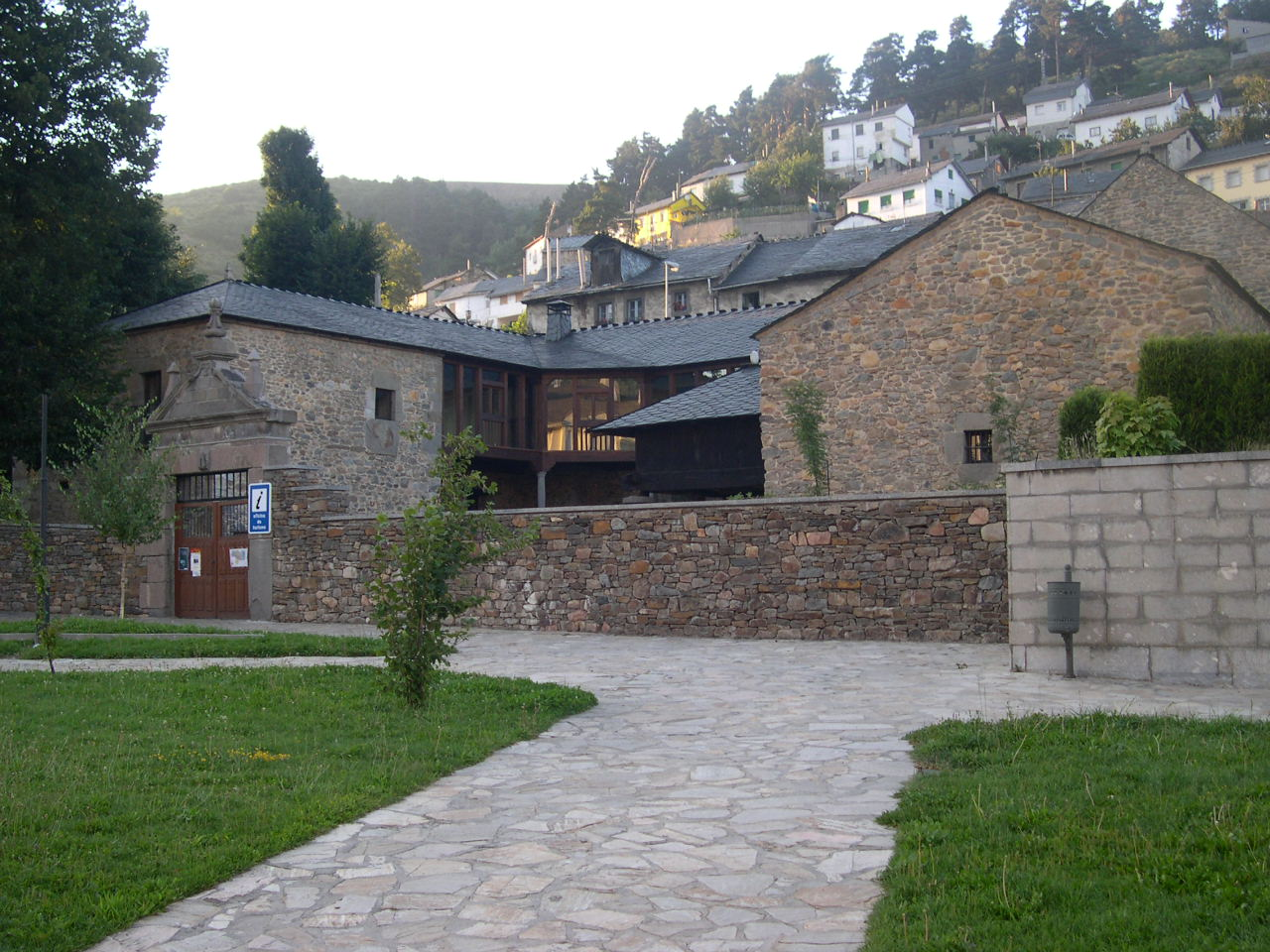 Sede de la fundacion Sierra-Pambley en Villablino